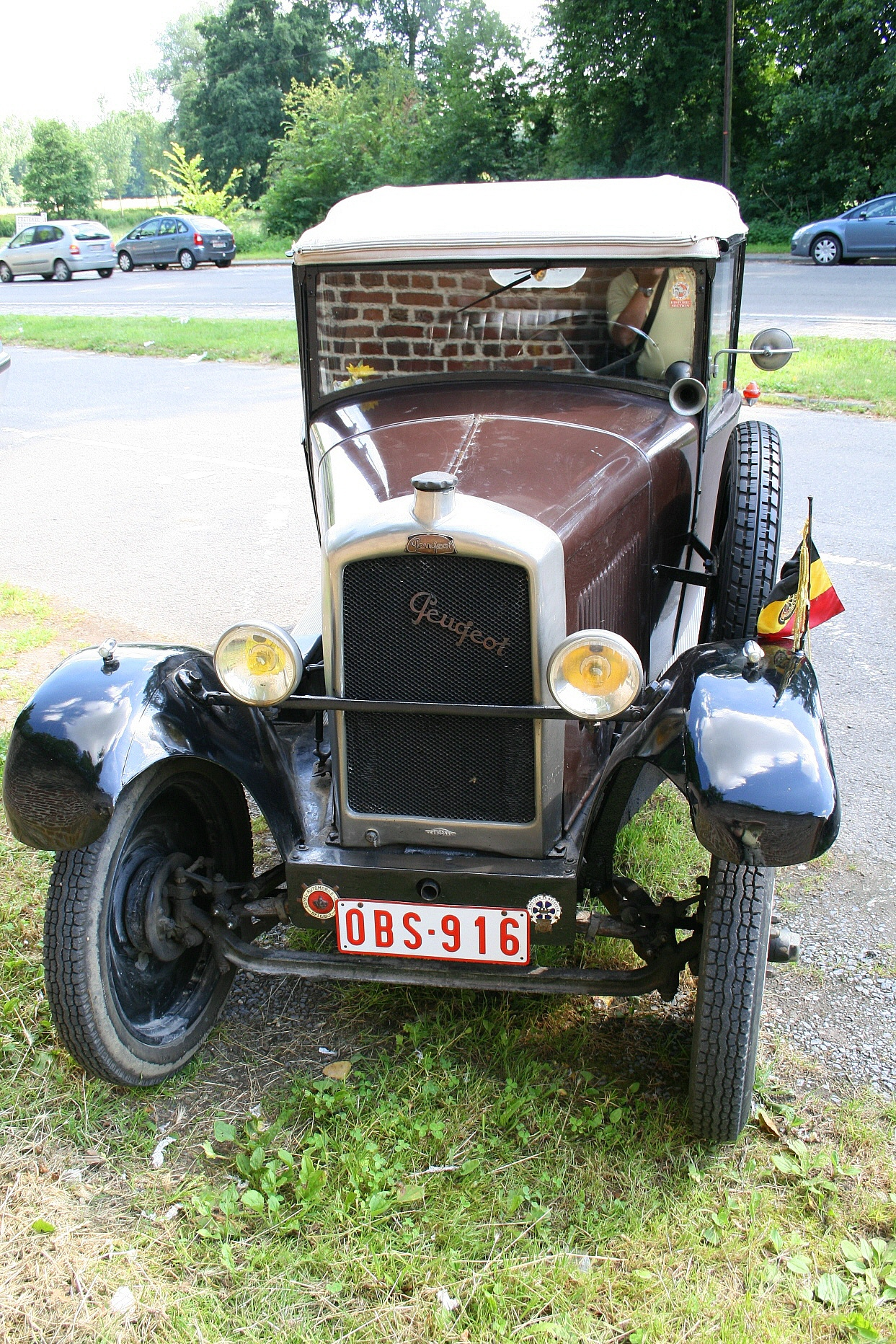 Peugeot 190 S cabriolet photographiée sur le parking du domaine provincial d'Opheylissem (Belgique).